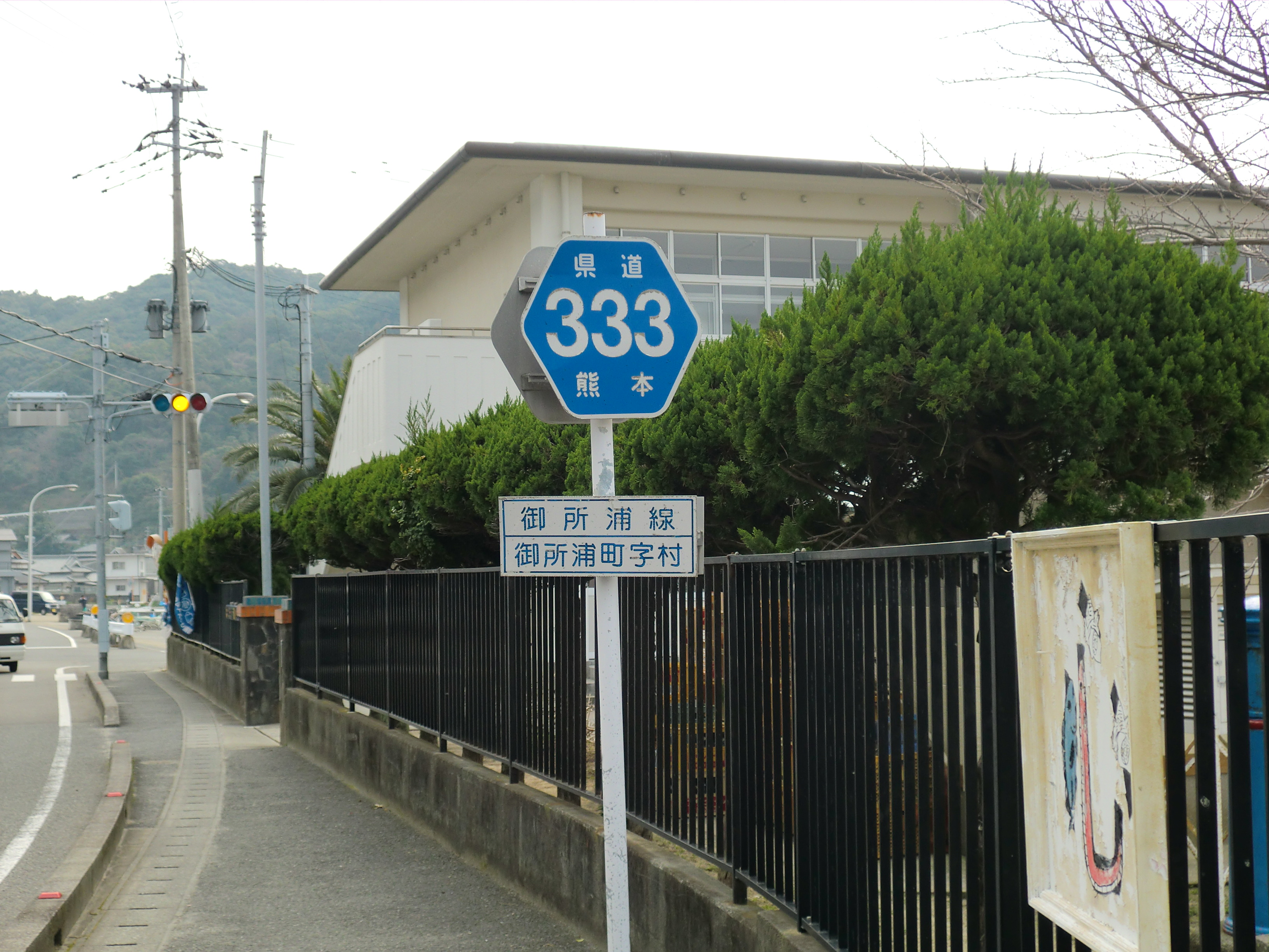 熊本県天草市にある熊本県道333号線（御所浦小学校前）